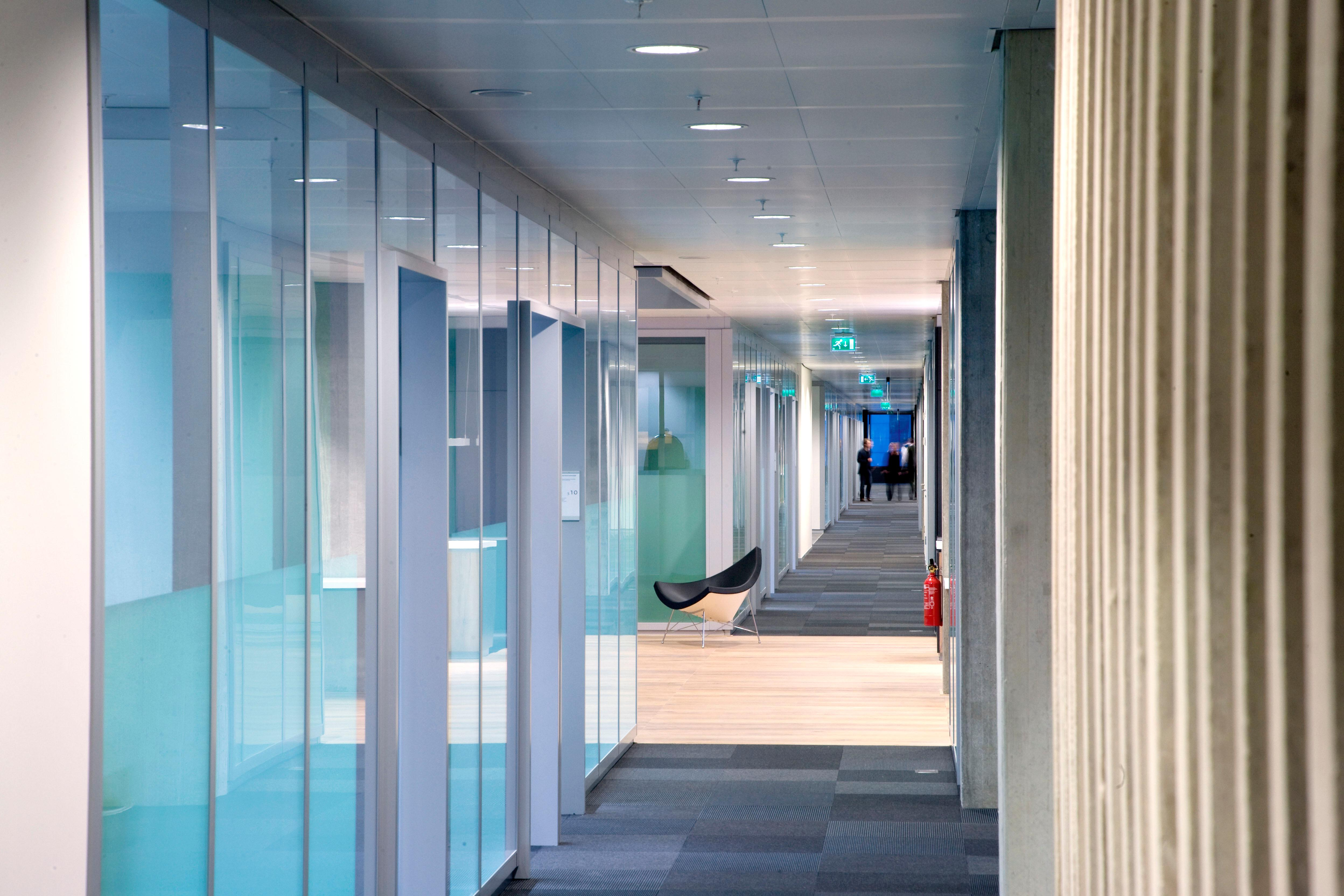 Kantoorverdieping Ministerie van Financiën - na de renovatie.